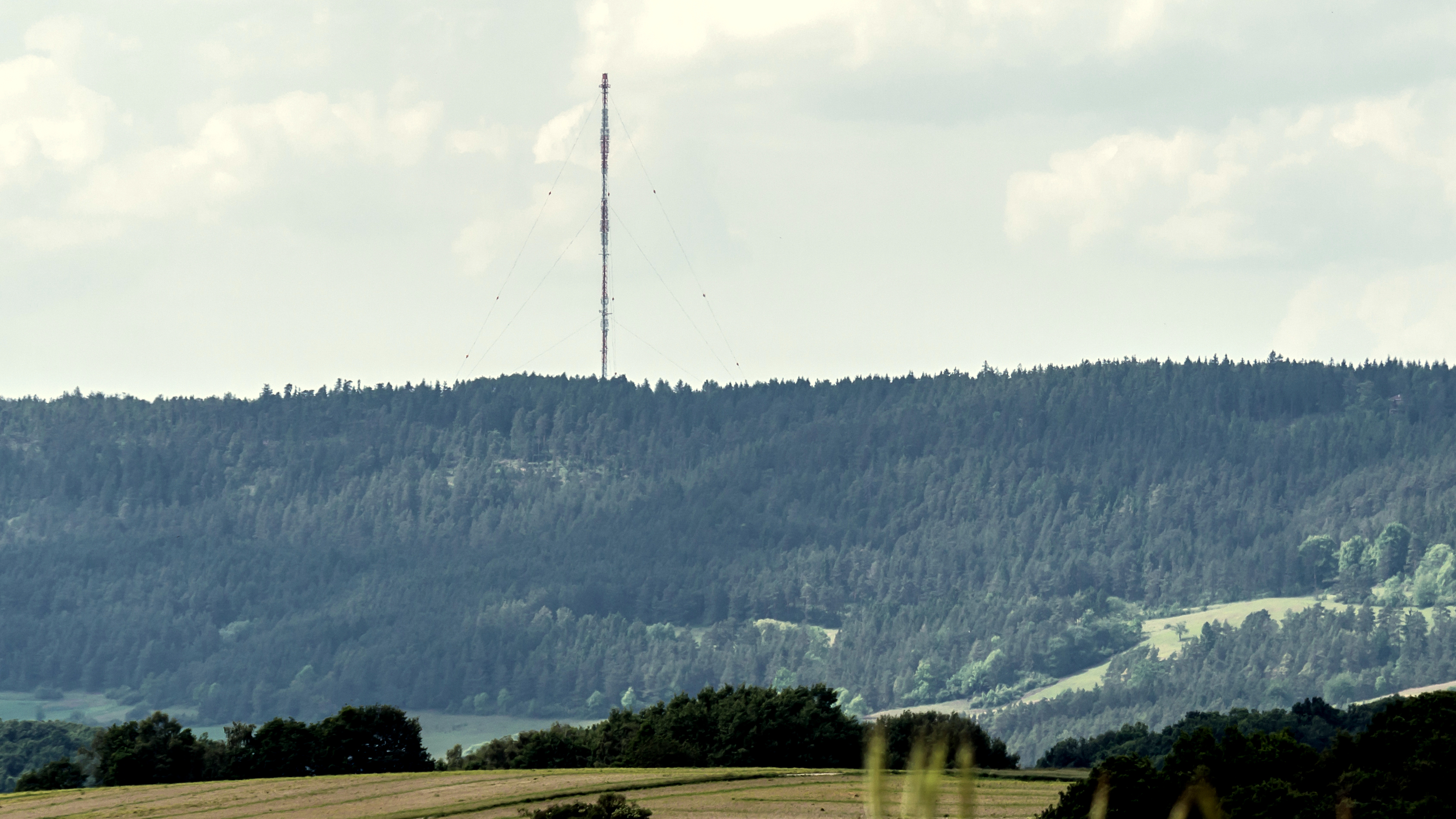 Großer Kalmberg oberhalb von Ehrenstein im Ilmkreis